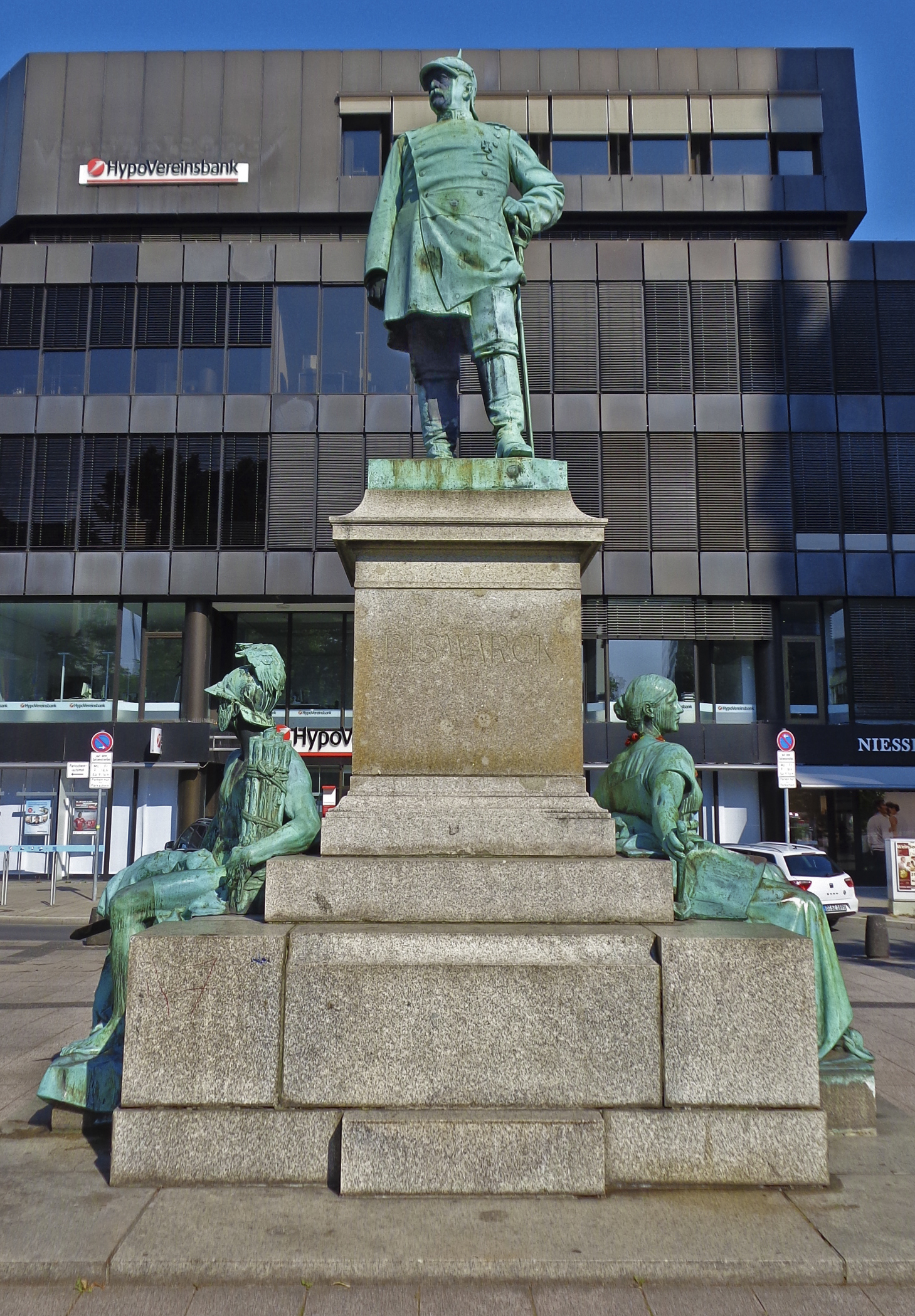 Bismarck-Denkmal auf dem Martin-Luther-Platz in Düsseldorf im August 2014.